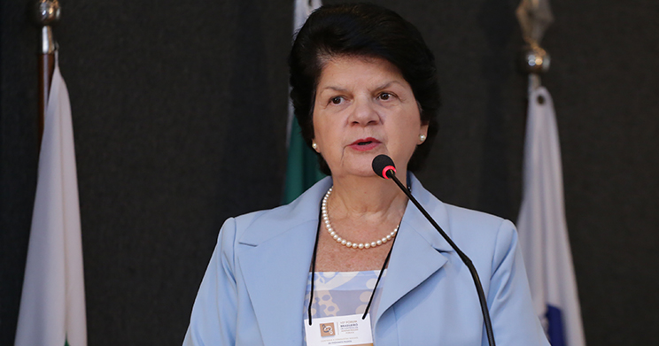 Maria Sylvia Zanella Di Pietro